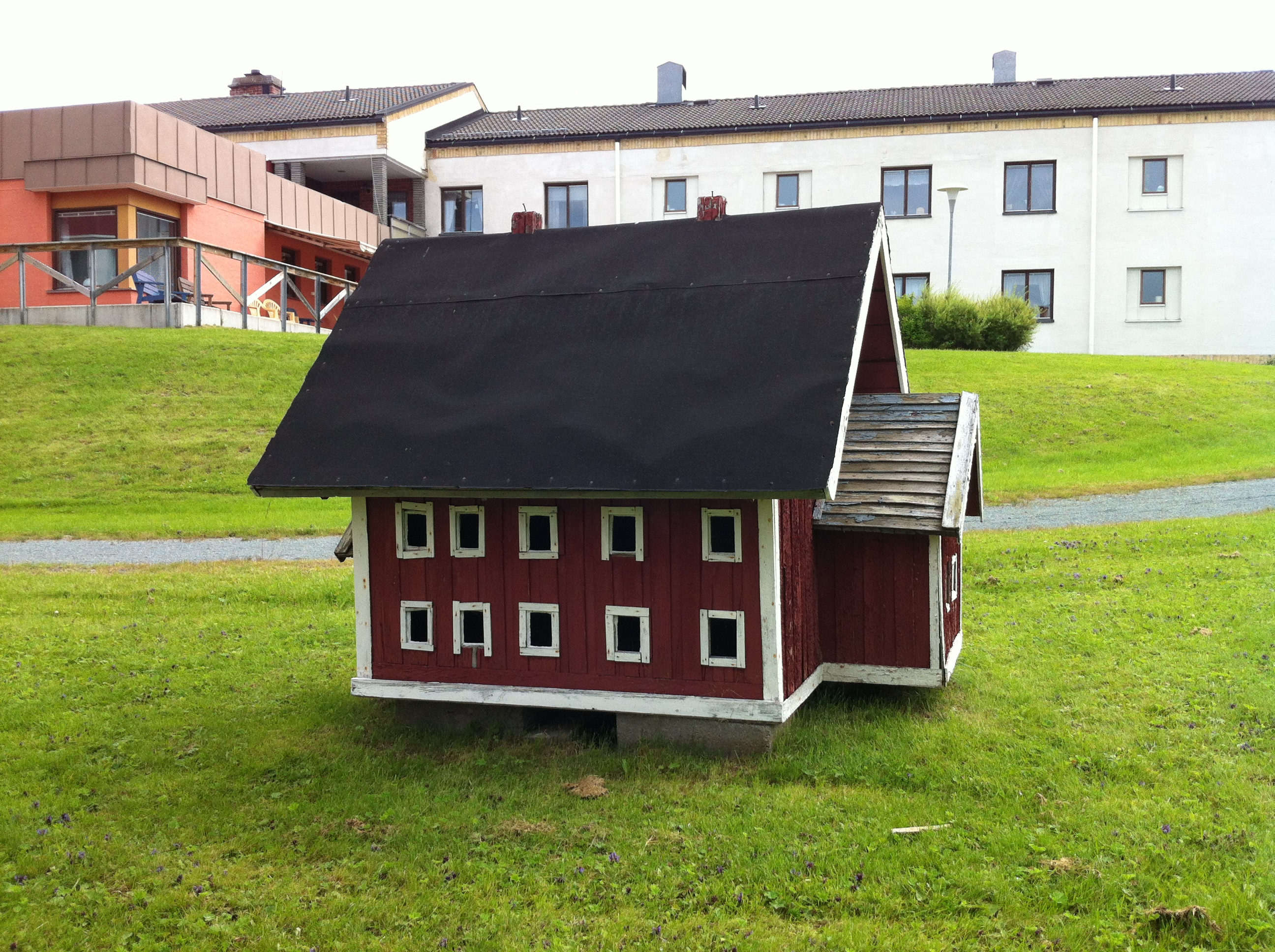 Modell av det tidigare ålderdomshemmet Åflohammar i Offerdals socken, Krokoms kommun, Jämtlands län. Modellen finns placerad vid Hällebo i Ede, Offerdals socken.